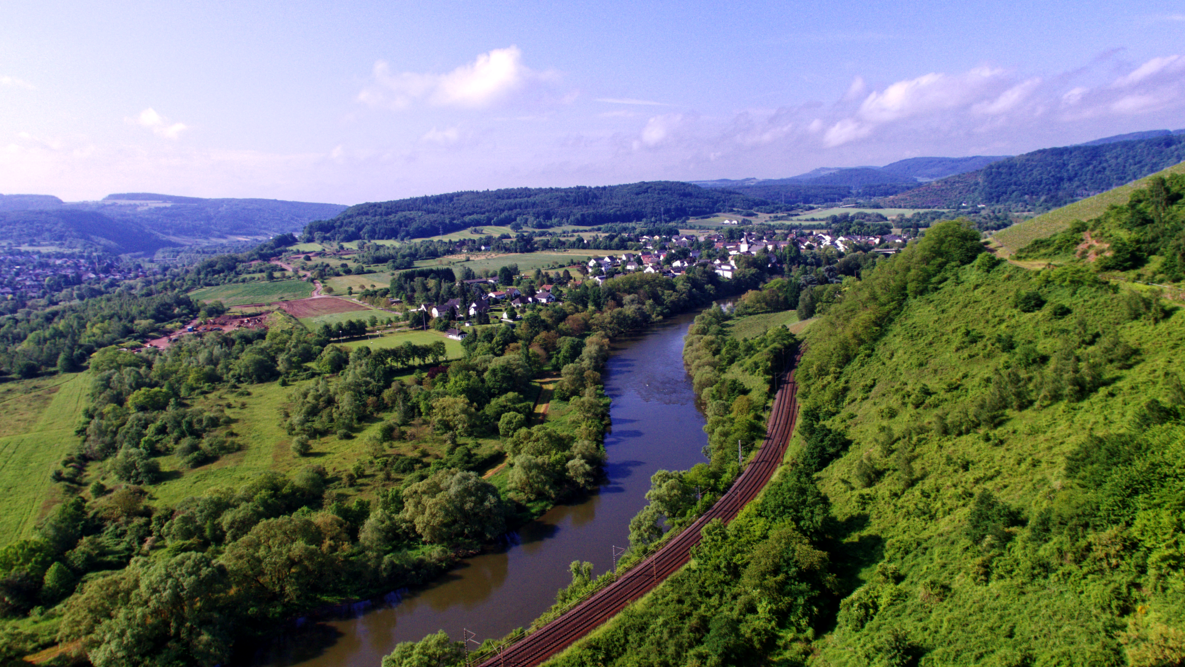 Blick von der Wiltinger Kupp über das Naturschutzgebiet Wiltinger Saarbogen nach Kanzem